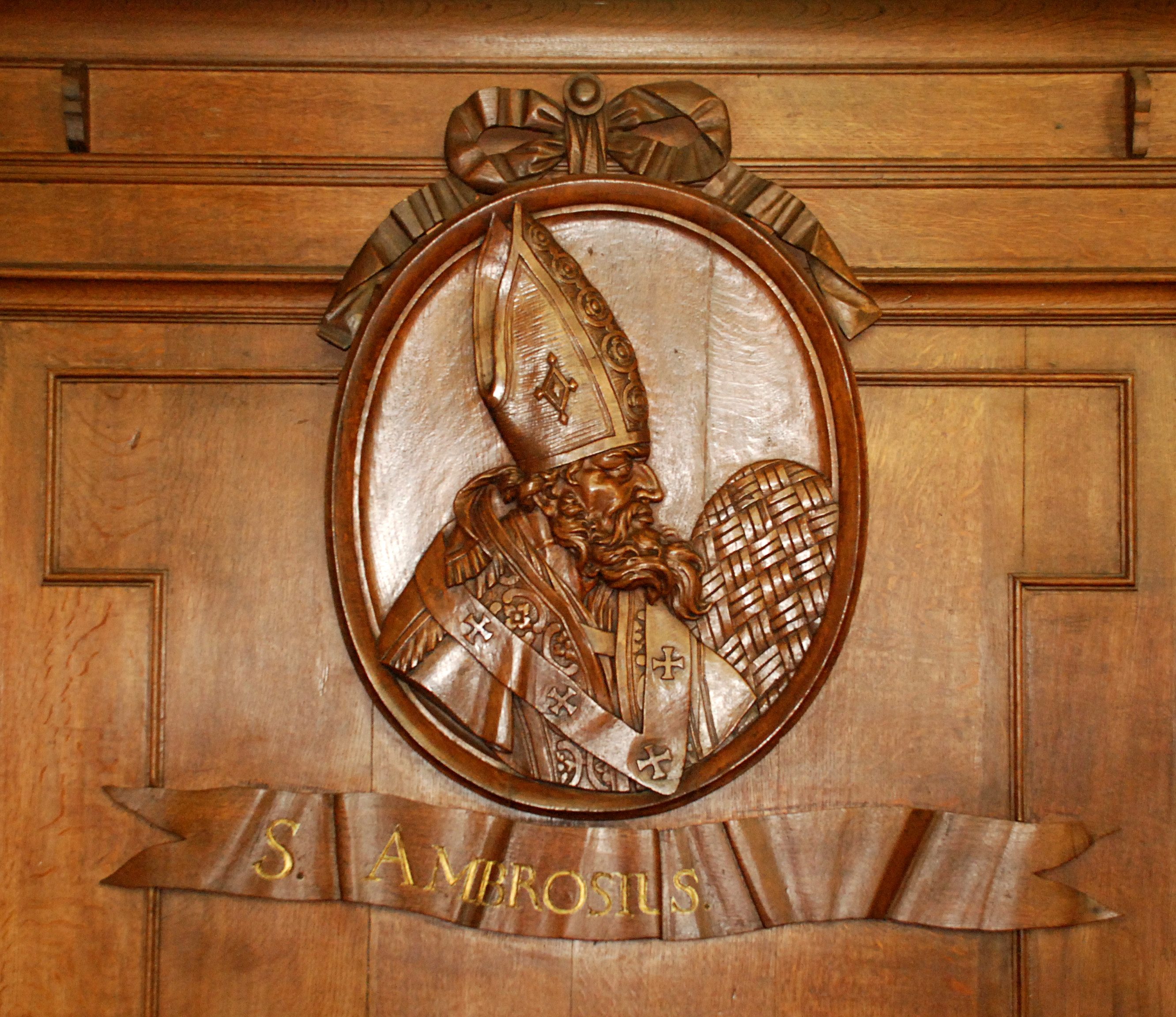 Belgique - Brabant wallon - Genappe - Glabais - Église Saint-Pierre